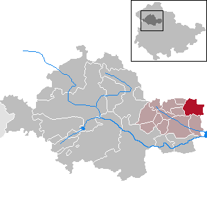 Kutzleben in Thuringia - Unstrut-Hainich-Kreis